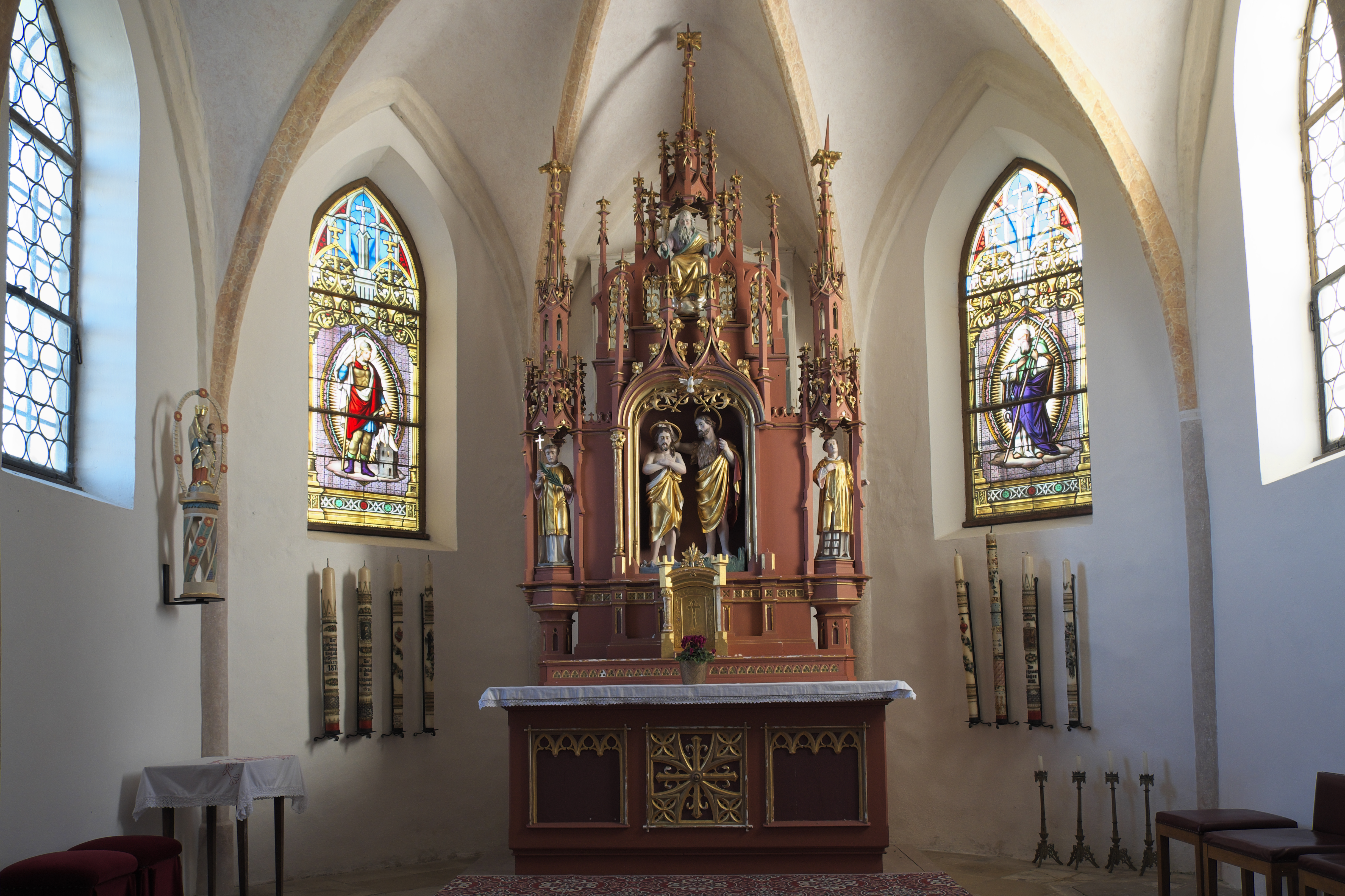 Katholische Filialkirche St. Johannes der Täufer in Sankt Johann (Siegsdorf) im Landkreis Traunstein (Bayern/Deutschland), Chor